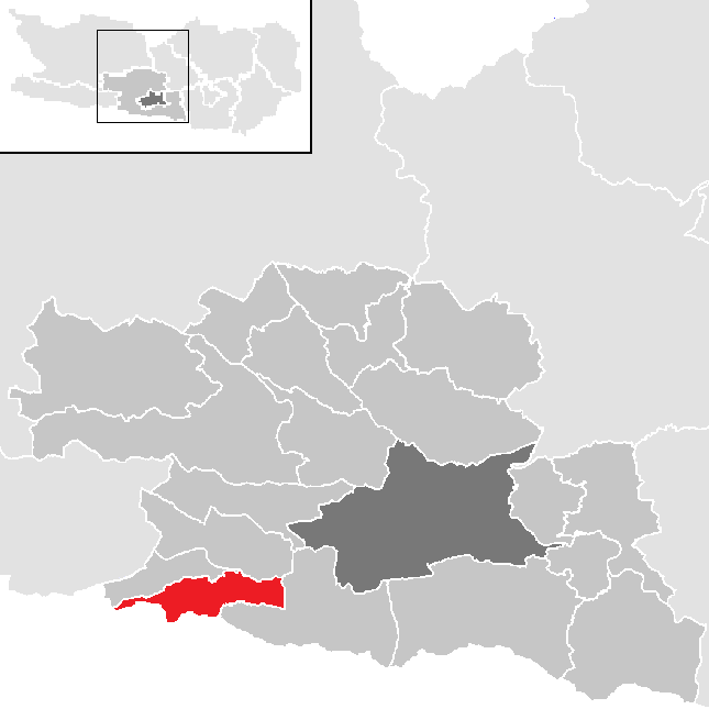 Bezirk Villach-Land